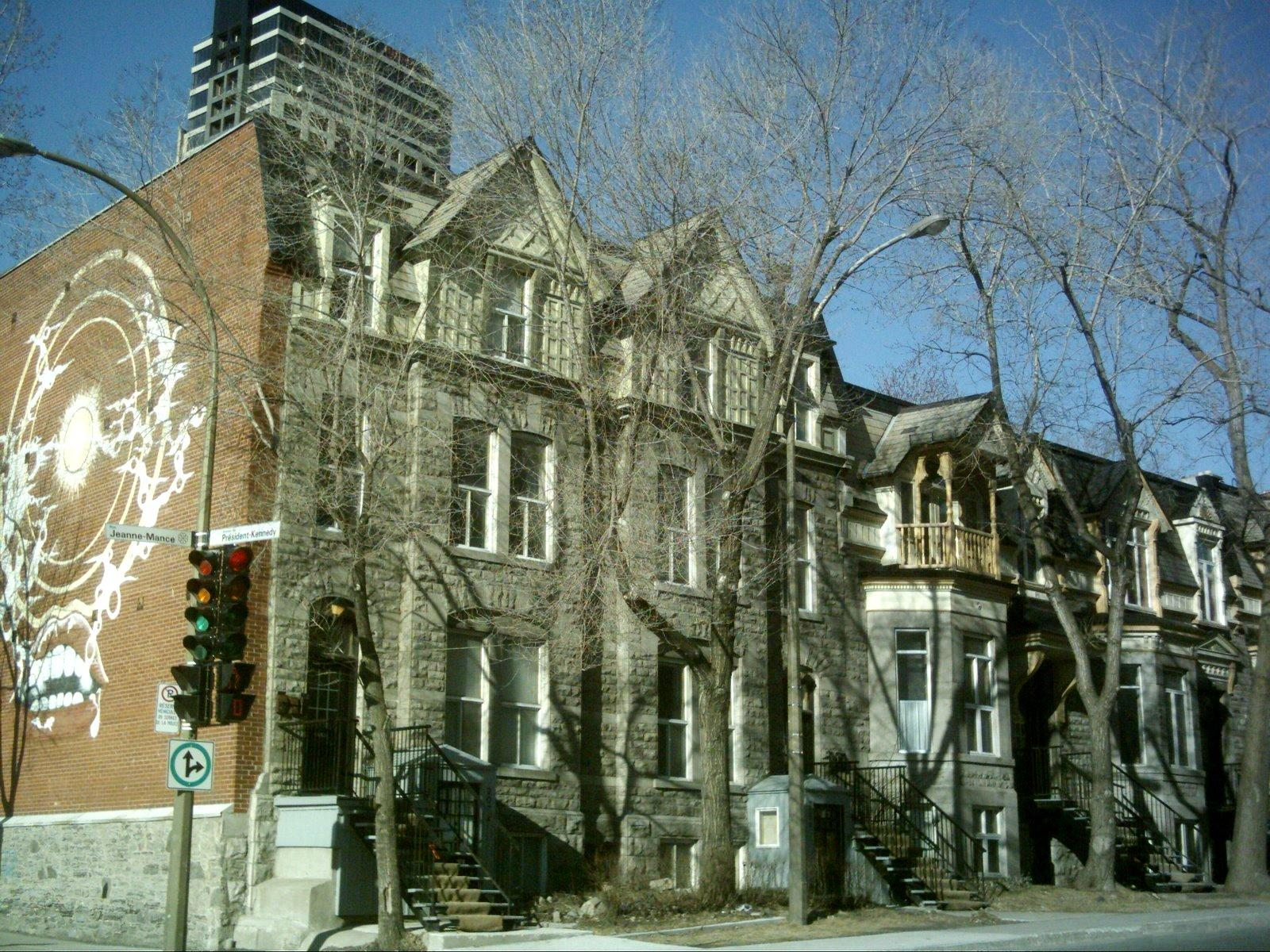 La rue Jeanne-Mance à Montréal. On a conservé, au sud de la rue Sherbrooke, un paysage de maison de style victorien.